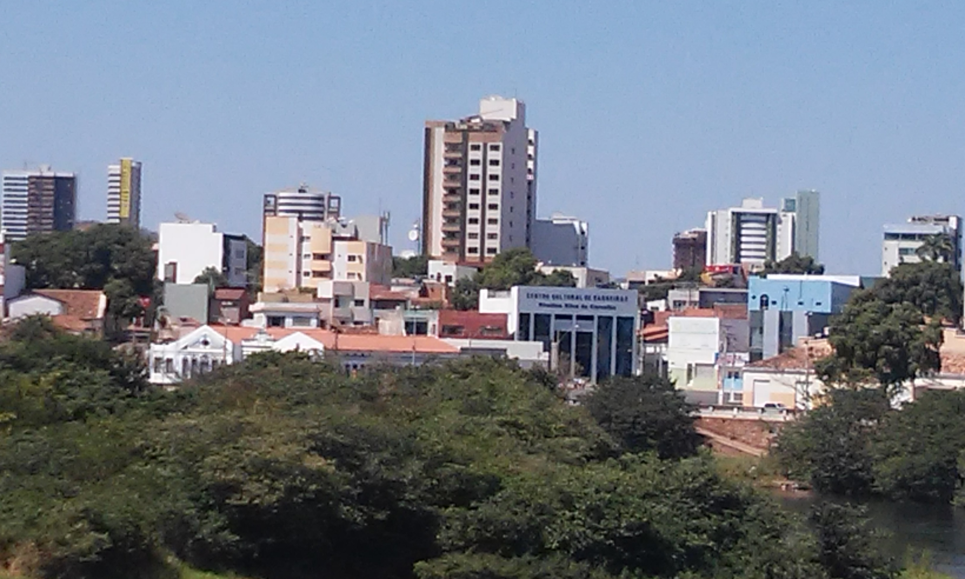 Foto tirada em Barreiras